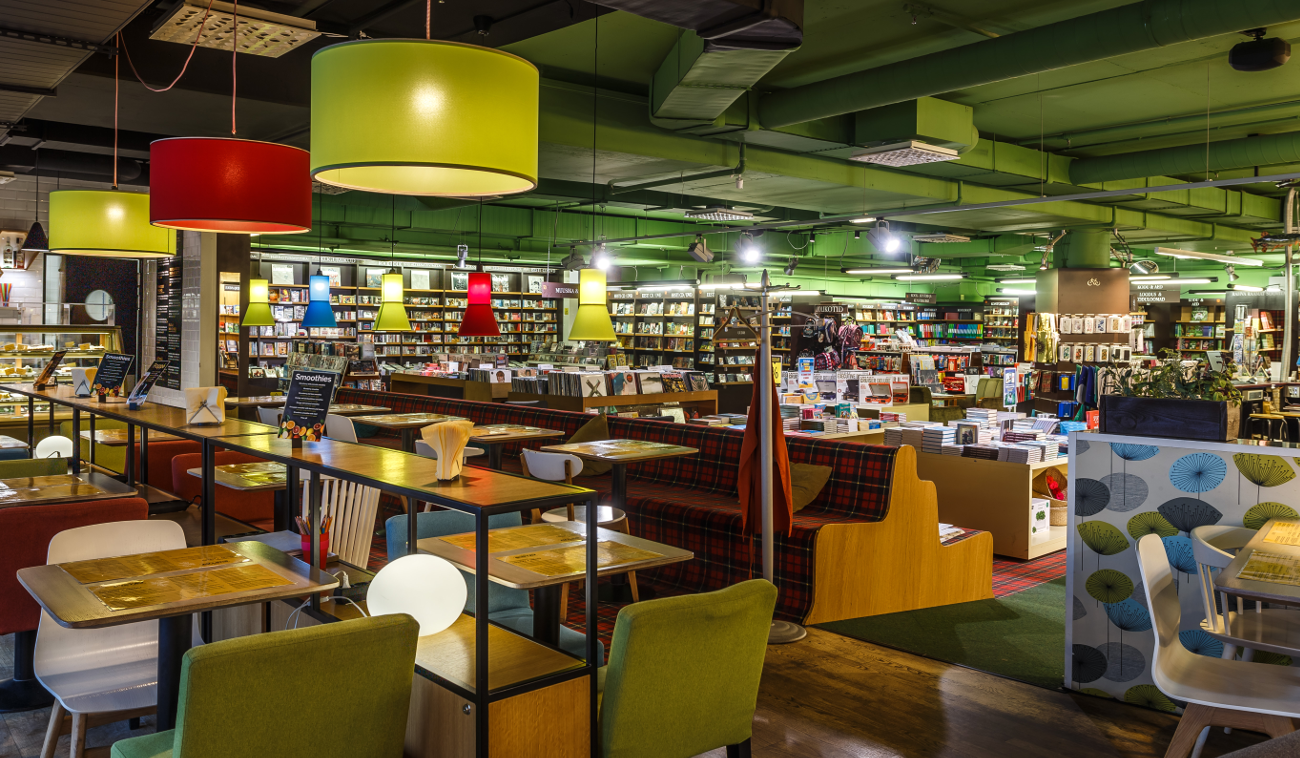 Rahva Raamat Viru keskuses on Baltimaade suurim raamatupood, kus toimuvad tihti raamatuesitlused, kirjanike autogrammitunnid ja kultuuriüritused. Pood on valitud maailma nelja parima kaupluse hulka.